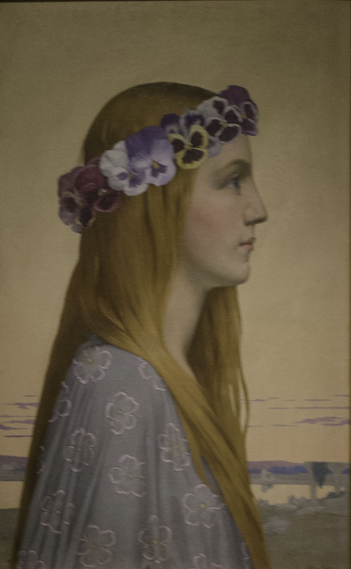 Alexandre Séon (1855-1917), La Pensée, huile sur toile